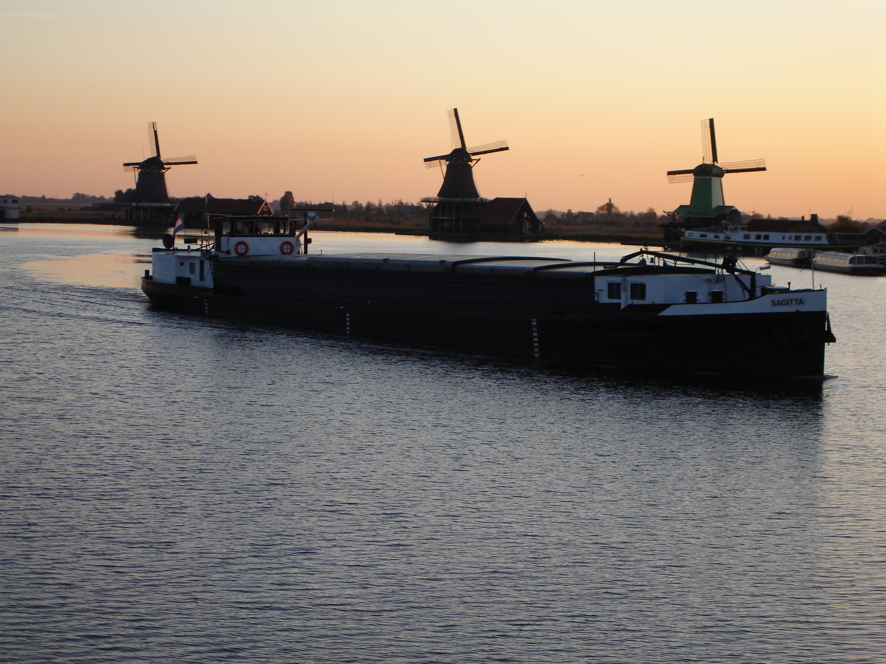 Sagitta varen Zaanse schans